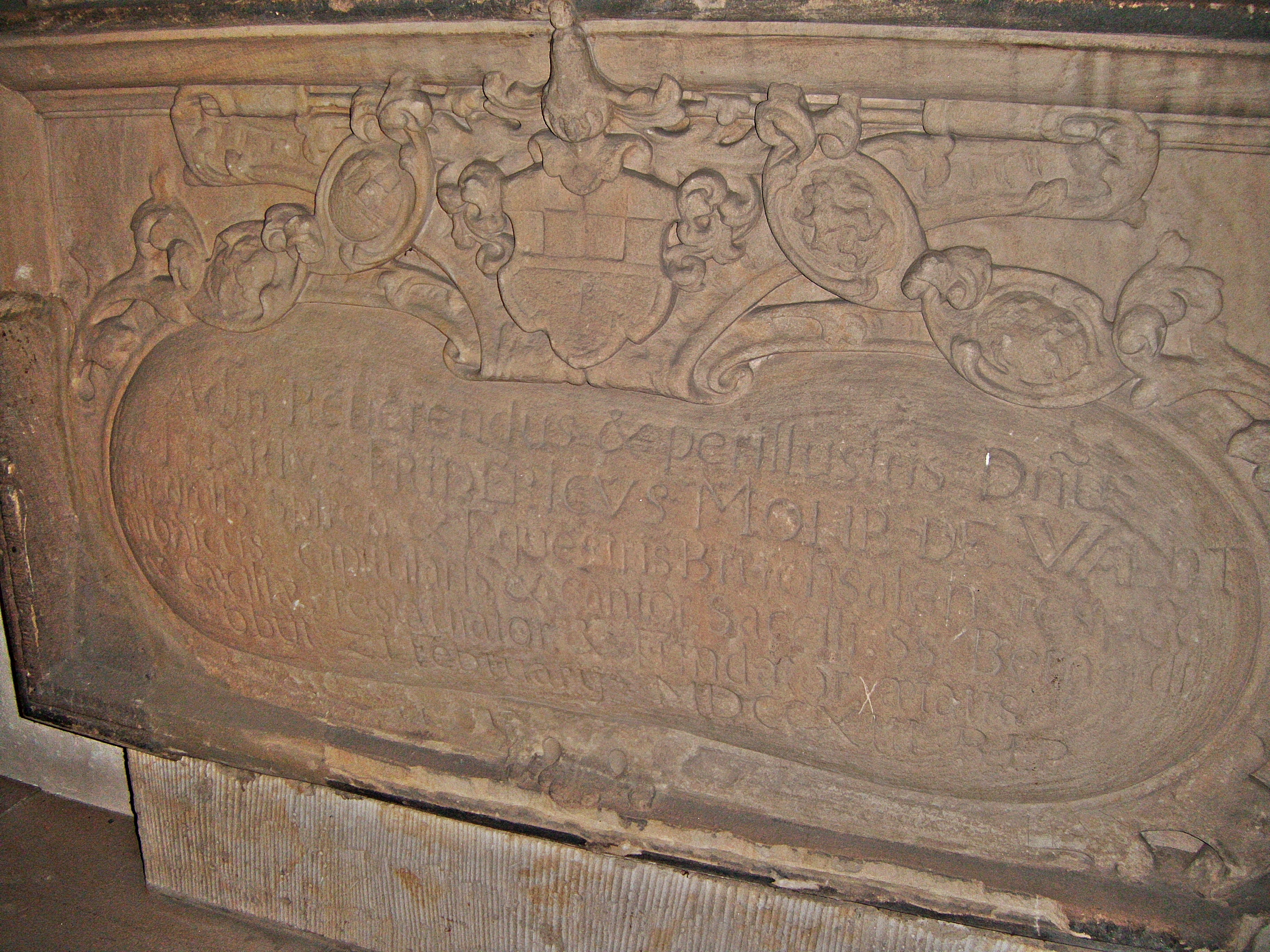 Speyerer Dom, Epitaph des Domherrn Lothar Friedrich Mohr von Wald (1659-1713), Inschriftkartusche mit Familienwappen